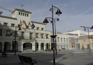 Plaza de la Constitución de San Sebastián de los Reyes, Madrid, España